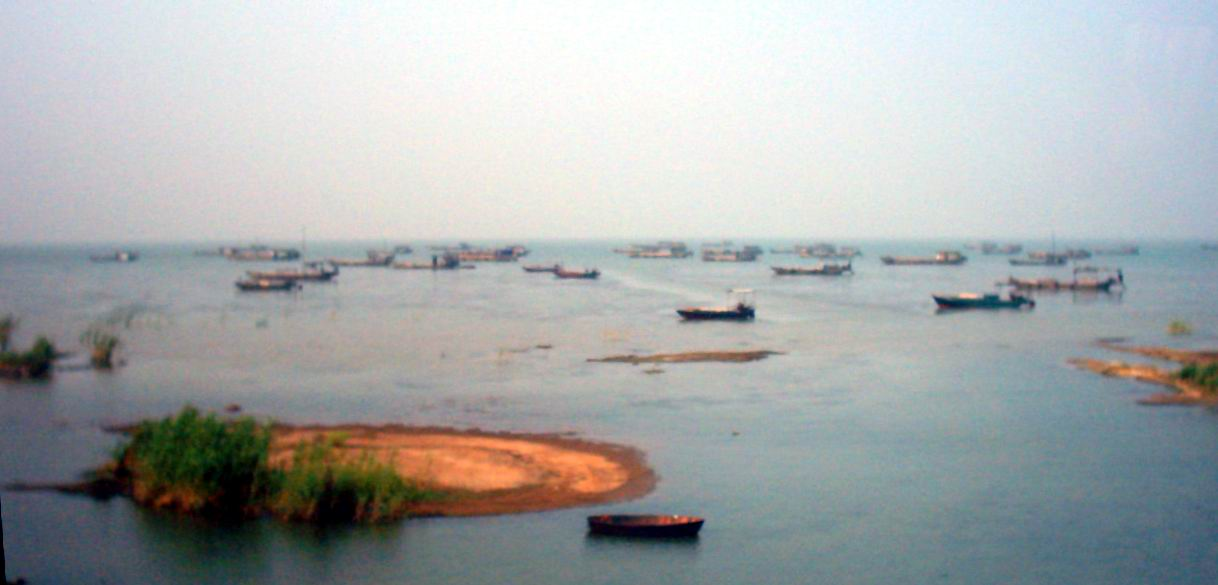 巢湖风景